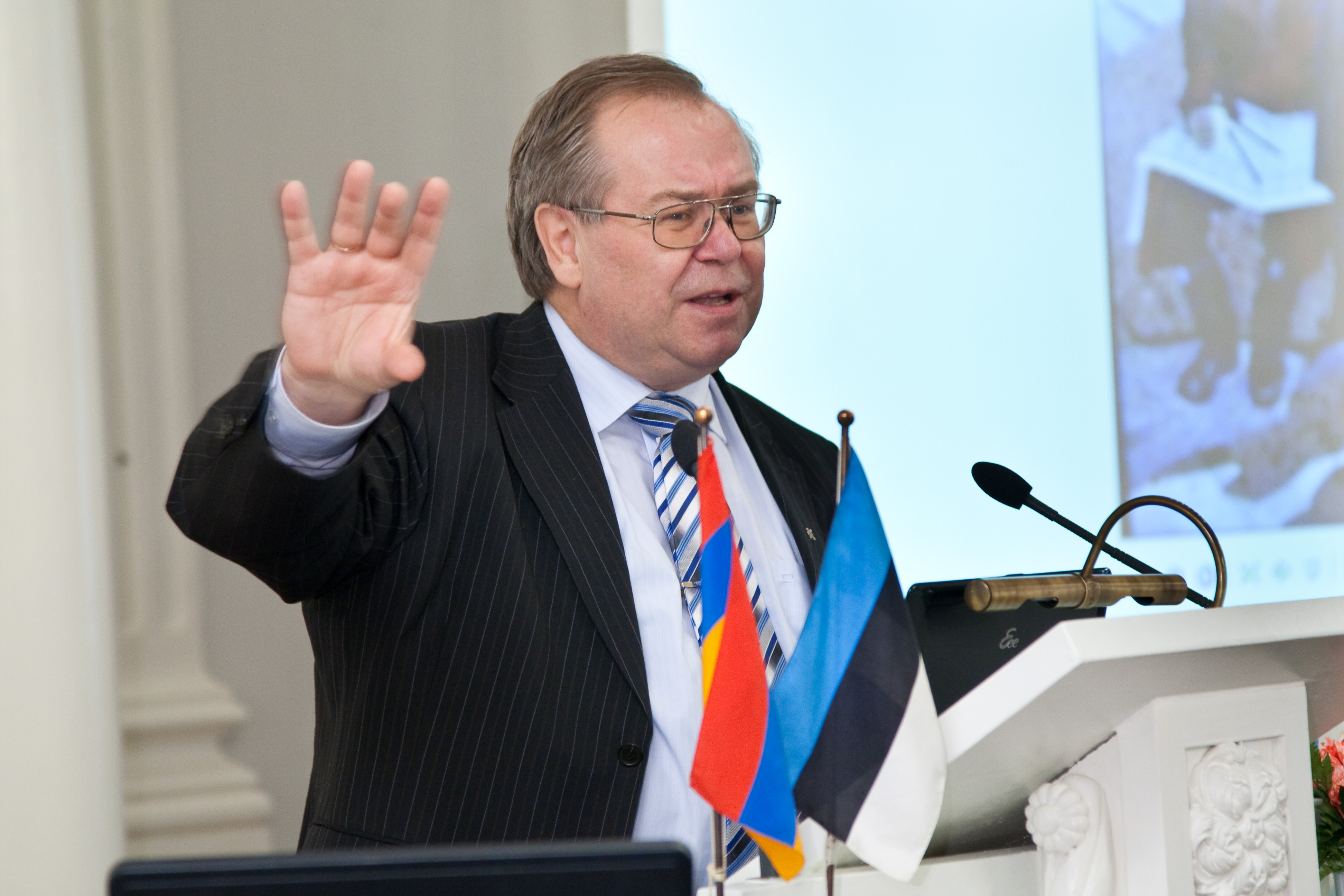 Tartu Ülikooli aulas ülikooli vilistlase, armeenia kirjakeele rajaja Hatšhatur Abovjani 200. sünniaastapäevale pühendatud konverents 15. oktoobril 2009 TÜ aulas. Esineb professor Aadu Must.